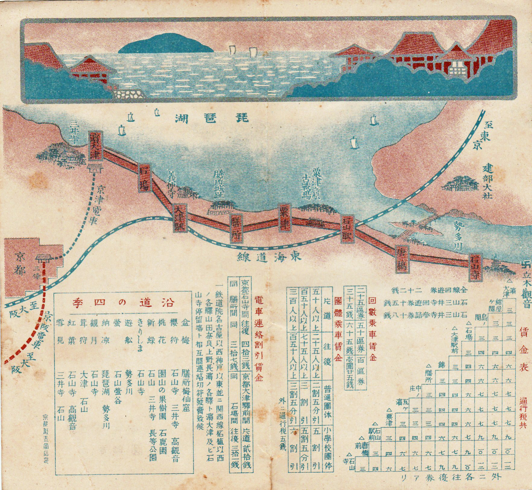 大津電車軌道が１９１６（大正５）年に発行した「大津電車遊覧案内」の裏面。膳所駅が「大津駅前」、膳所本町駅が「膳所」で「紺屋ヶ関」駅がある。